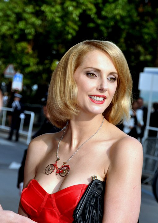 Frédérique Bel au festival de Cannes